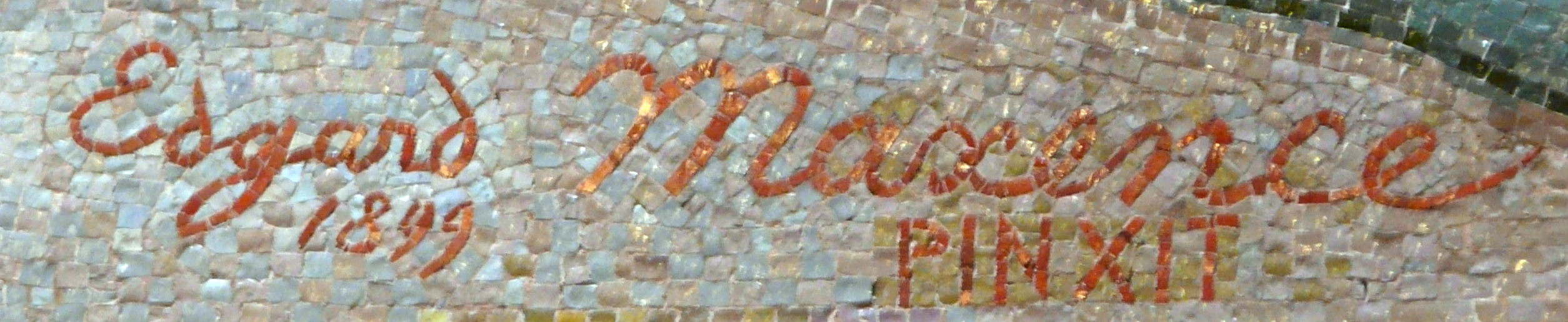 Signature d'Edgard Maxence sur le panneau de mosaïque représentant l'Ascension, basilique Notre-Dame du Rosaire, Lourdes, Hautes-Pyrénées, France.